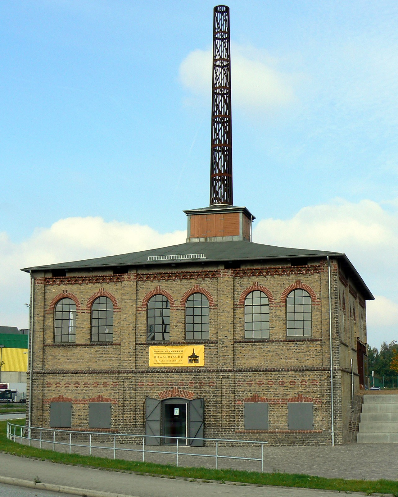 Alte Metallgießerei der Kieler Schiffswerft von Georg Howaldt in Kiel. Erbaut vom Architekten Heinrich Moldenschardt, 1884. Heute ein Industriemuseum. Frontansicht. This is the photograph of an architectural monument. It is part of the list of cultural monuments of Kiel